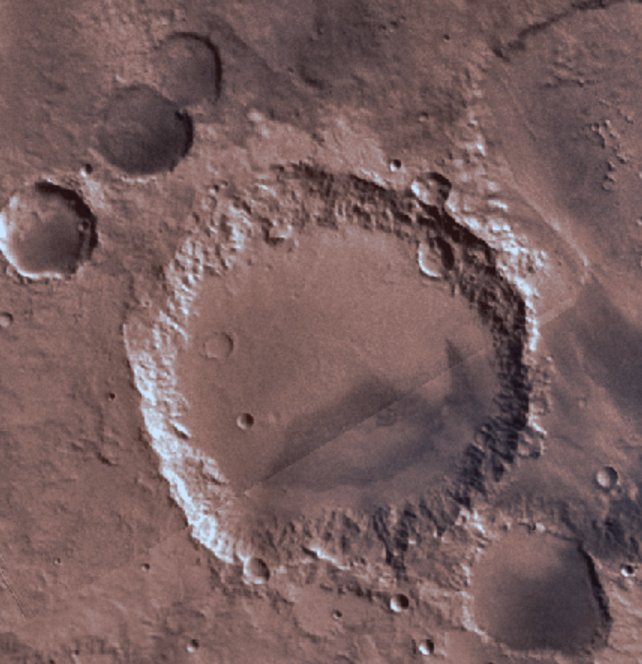 Cráter marciano Beer. (IAU/USGS/Goddard/A SU/USGS)